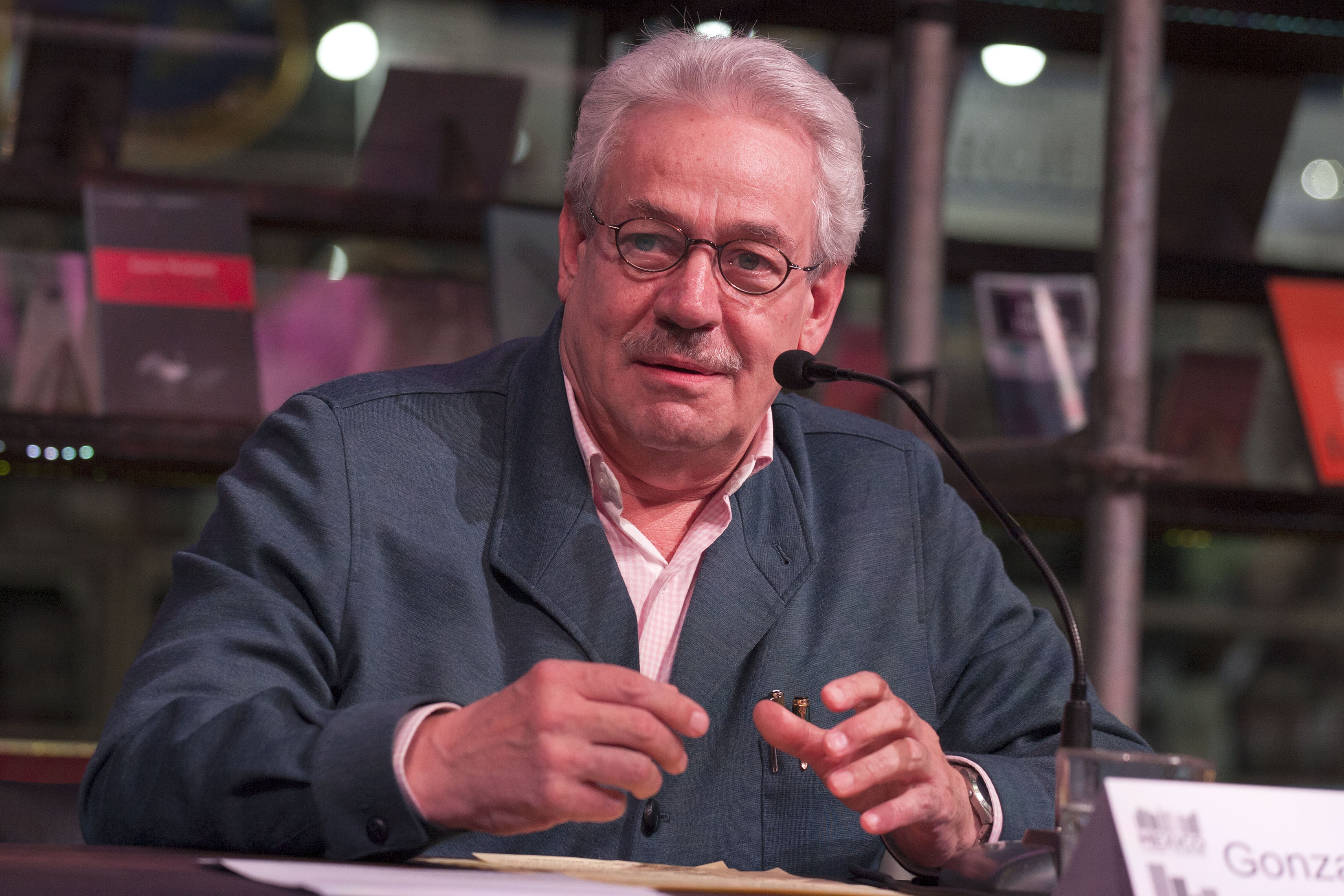 Lunes, 4 de Mayo 2015. En el marco de la 41a Feria Internacional del Libro de Buenos Aires se realizó la conferencia: La literatura de la Ciudad de México con el escritor Gonzalo Celorio en el Stand de la Ciudad de México. Foto: Antonio Nava / Secretaria de Cultura Ciudad de México.